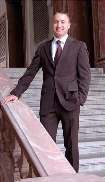 Prof. Dr. Thomas Otter